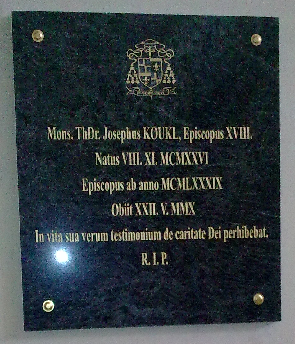 Josef Koukl, pamětní deska v katedrále sv. Štěpána